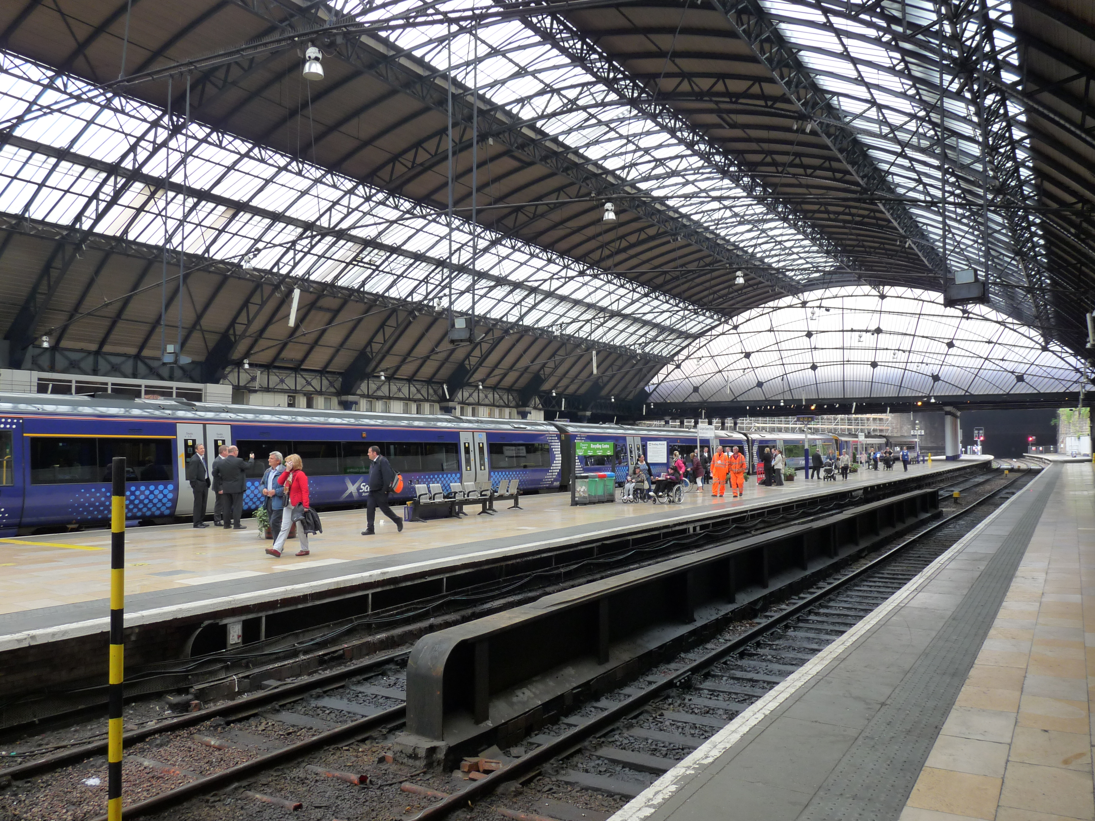 Glasgow Queen Street station